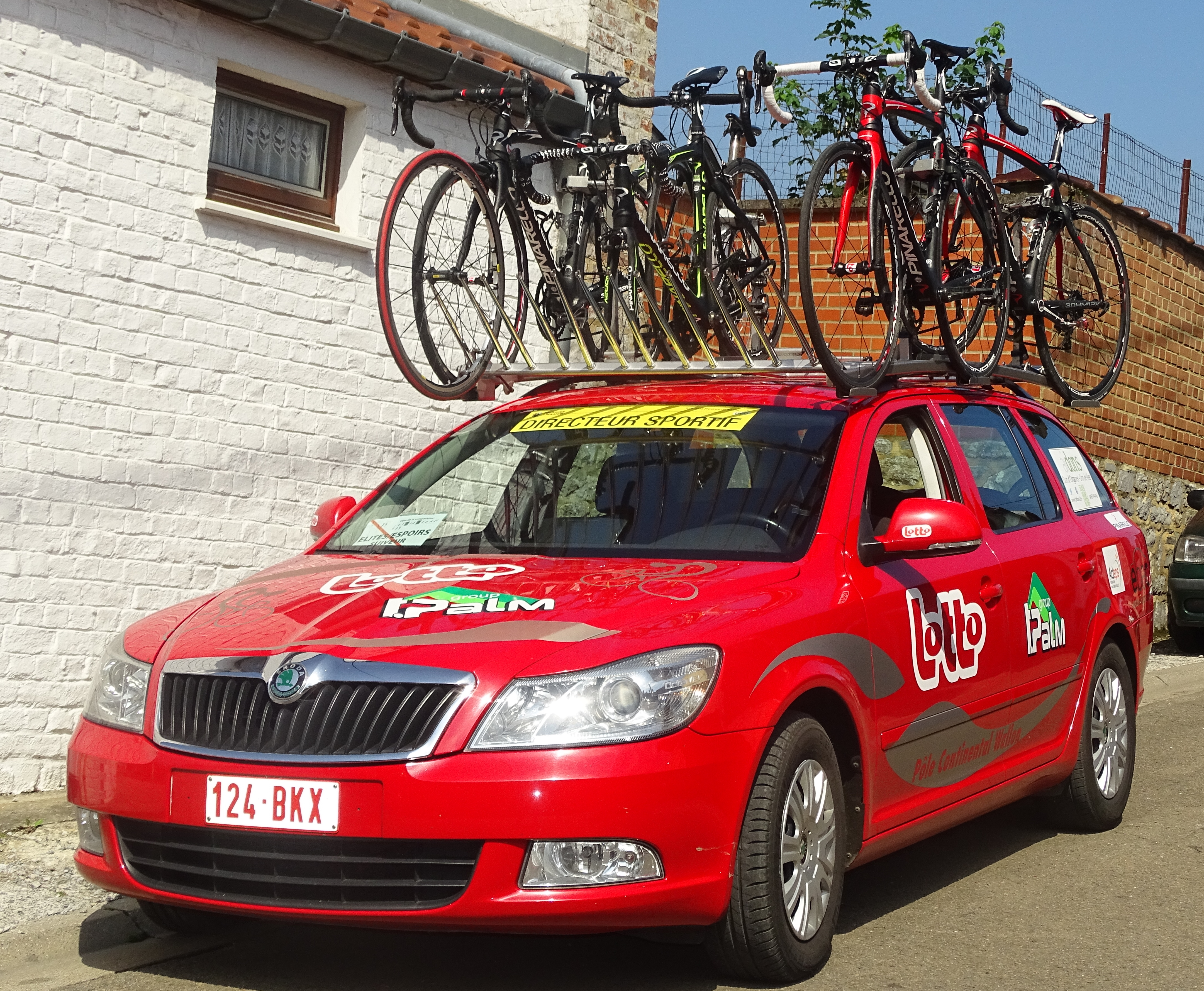 Reportage réalisé le vendredi 7 août à l'occasion du départ de la troisième étape du Tour de la province de Namur 2015 à Florennes, Belgique.